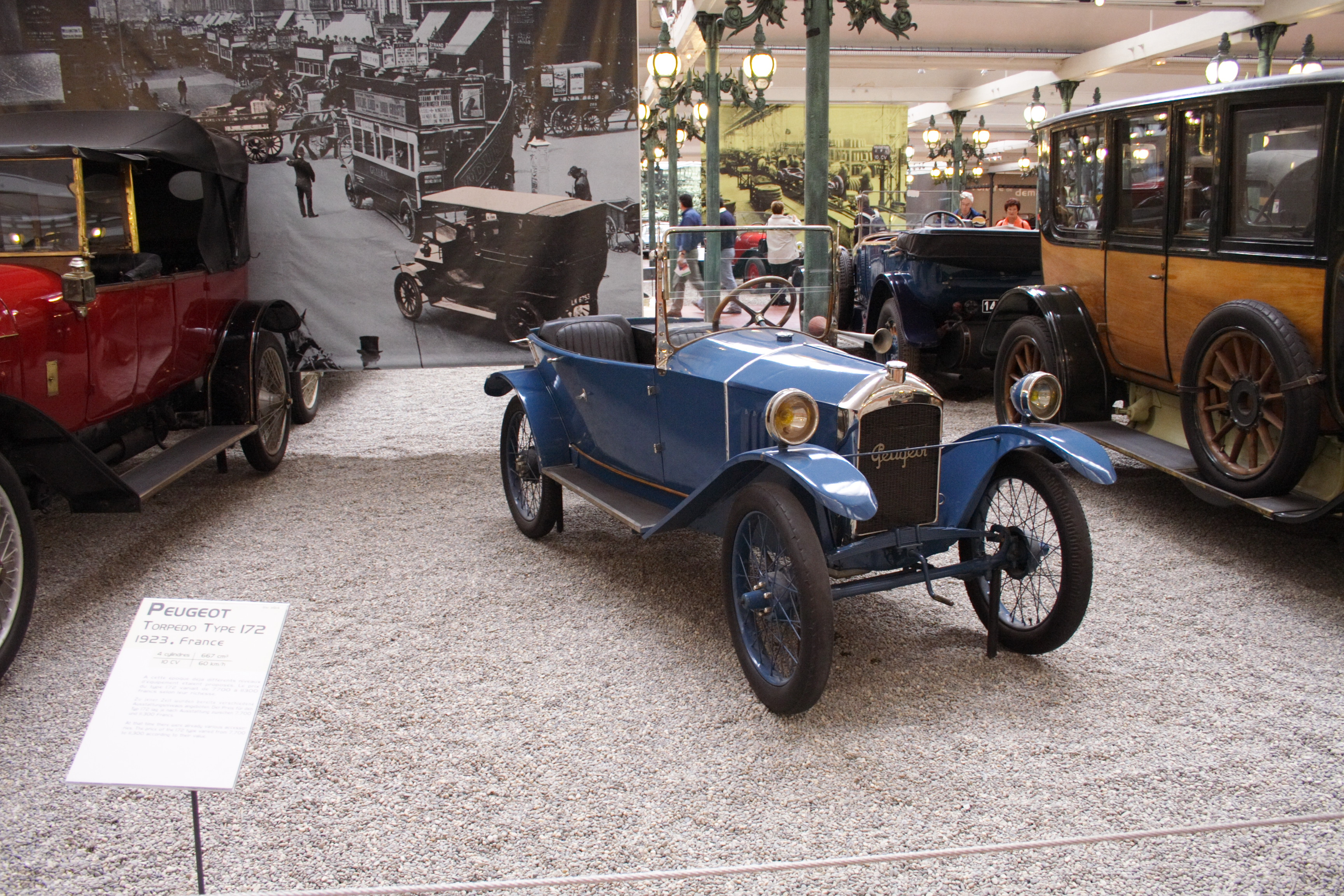 Renault Landaulet Type AGI at the Musée National de l'Automobil(Mulhouse, France)